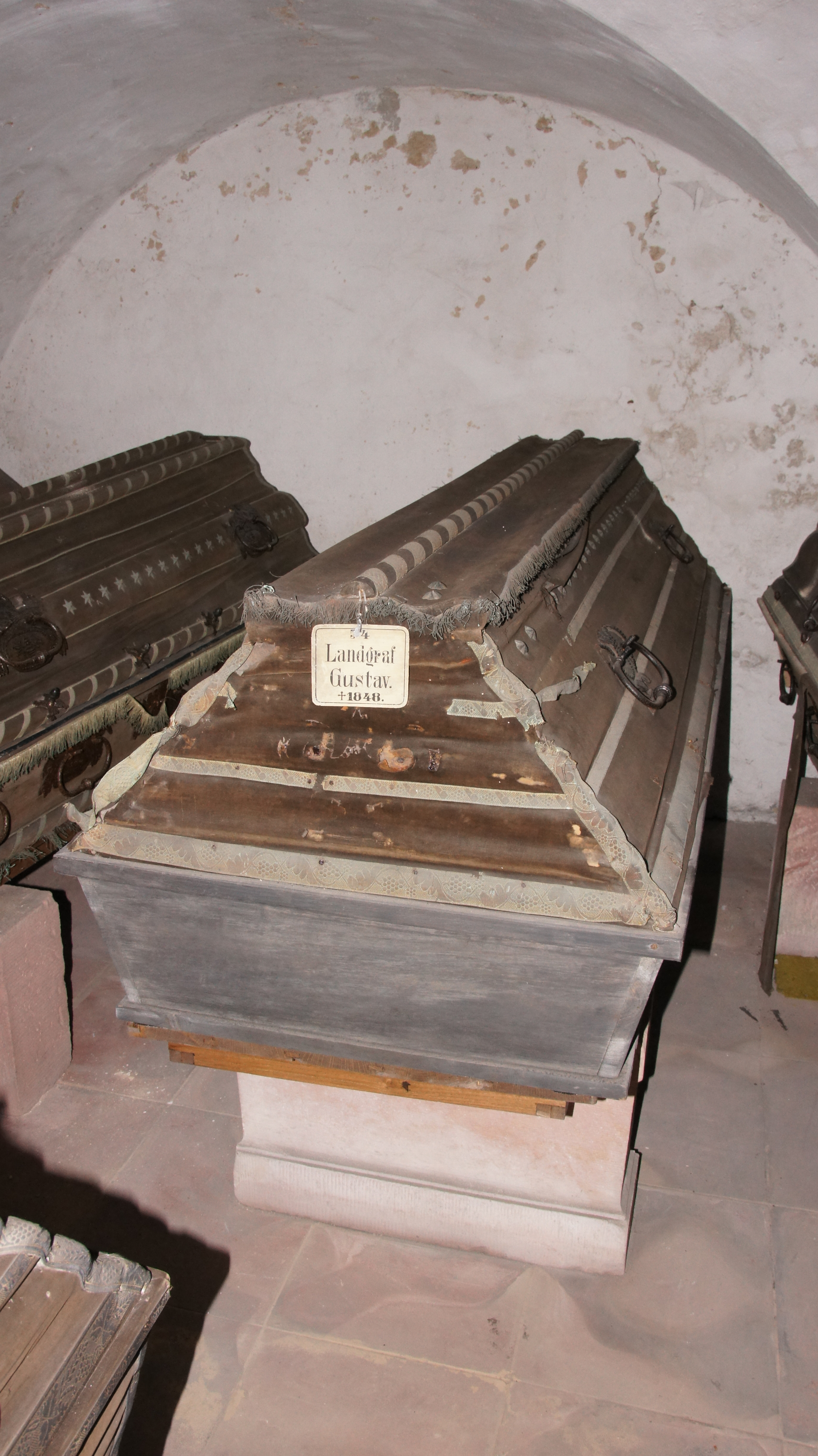 Bad Homburg vor der Höhe, Schloss, Gruft, Landgraf Gustav